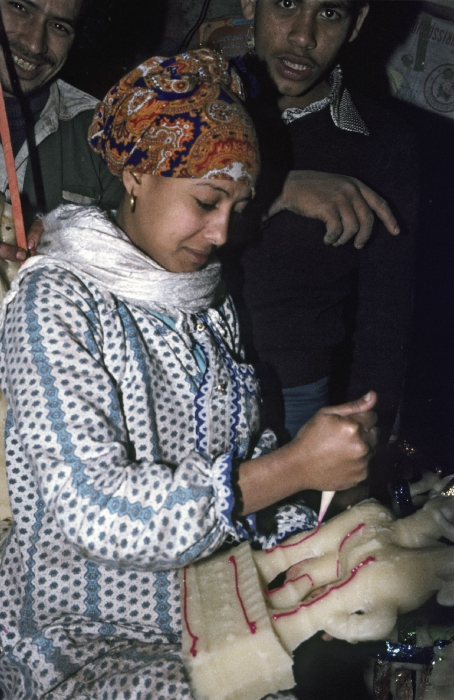 Dia uit een serie foto's die is gemaakt bij de aankoop van een aantal suikerwerkfiguren en mallen om suikerwerkfiguren in te vervaardigen (4635-18*/63). Suikerwerkfiguren worden aan kinderen kado gegeven bij de viering van mawlid an-nabi. Op deze dag wordt de verjaardag van de profeet Mohammed gevierd. Mawlid an-nabi wordt in Cairo gevierd met een kermis, optochten en soefi-ceremonies. De viering komt overeen met de mawlids van islamitische en Koptische heiligen in Egypte. De suikerwerkfiguren zijn het hele jaar door verkrijgbaar, maar worden vooral voor mawlid an-nabi verkocht. Ouders geven de suikerwerkfiguren kado aan hun kinderen. De traditionele verdeling was dat de jongens een boot kregen en de meisjes een pop. Andere figuren waren zowel voor jongens als meisjes bedoeld. Tegenwoordig is deze traditionele verdeling enigszins losgelaten.